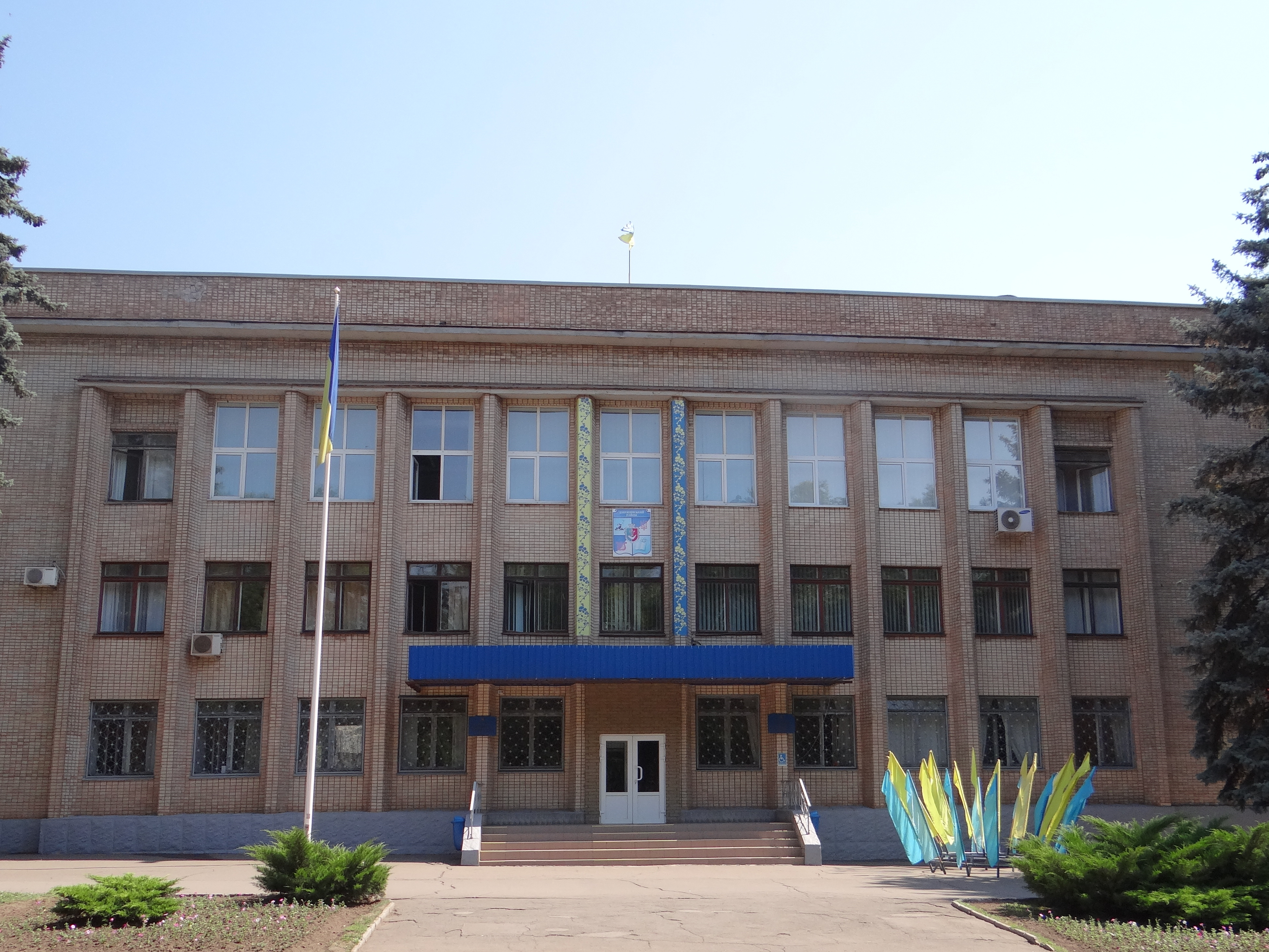 Дзержинський райвиконком